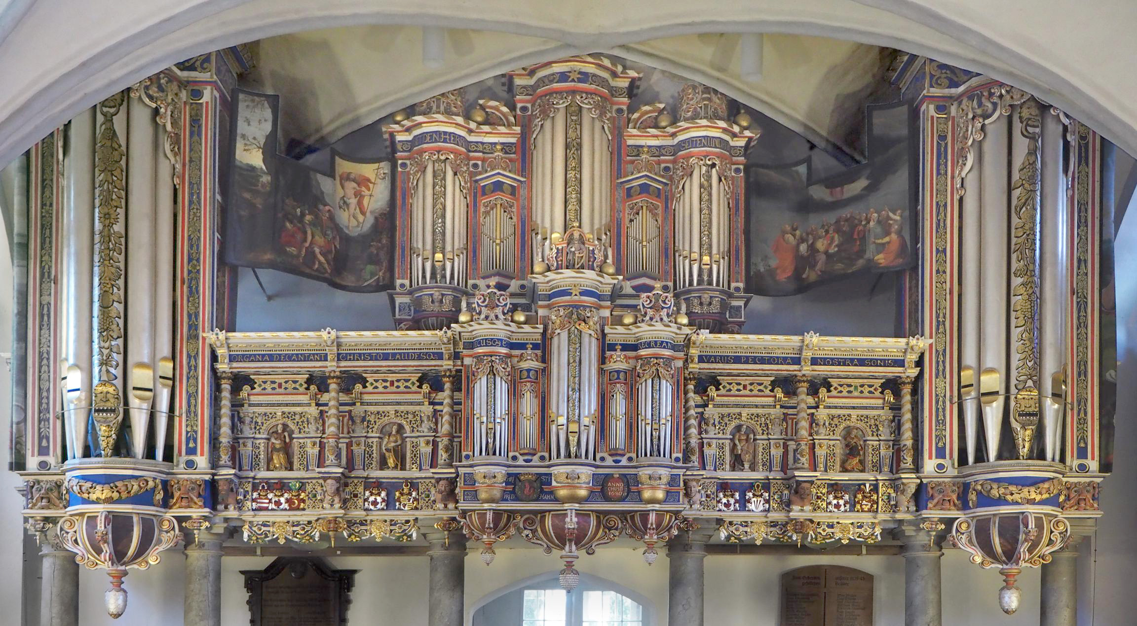 Mecklenburg-Vorpommern, Basedow, Kirche, Orgel, Foto: September 2015